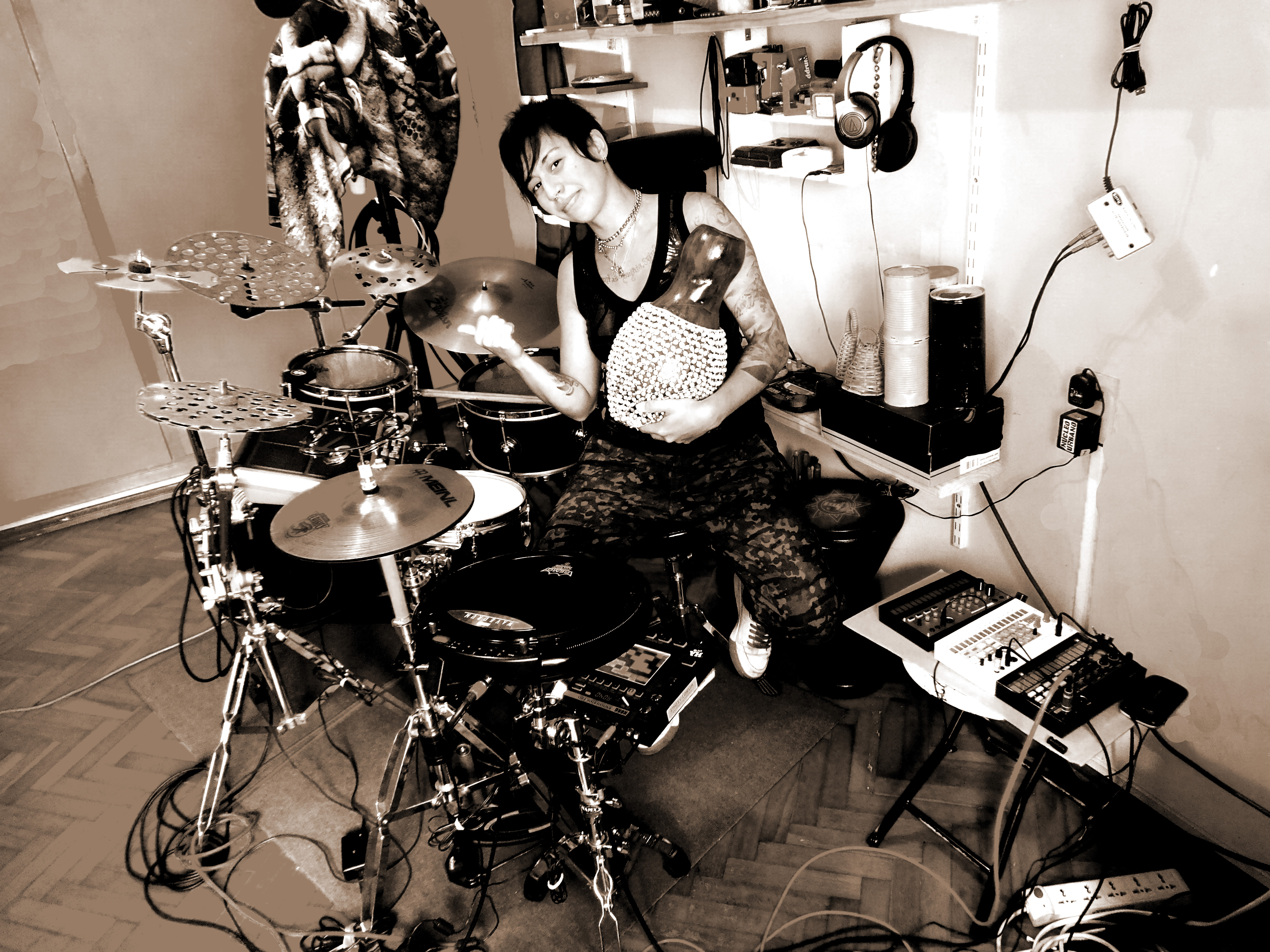 Albana Barrocas en 2017